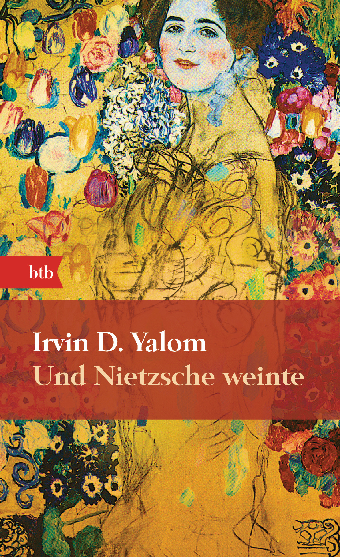 Irvin D. Yalom: Und Nietzsche weinte. btb, München, 2009. DNB